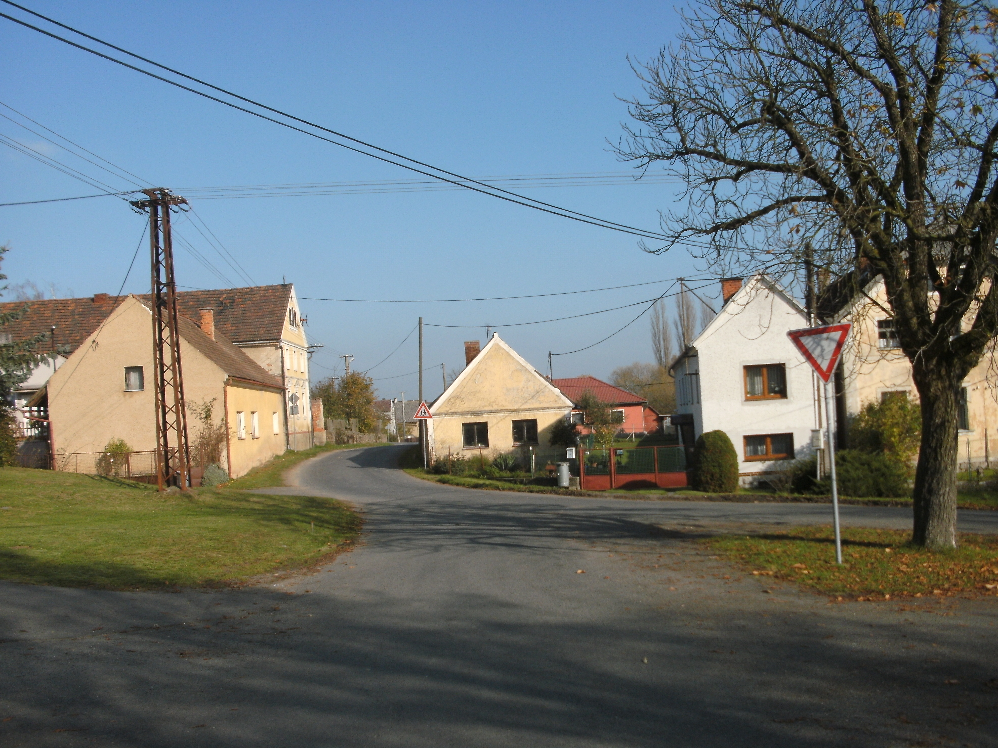 Mířkov